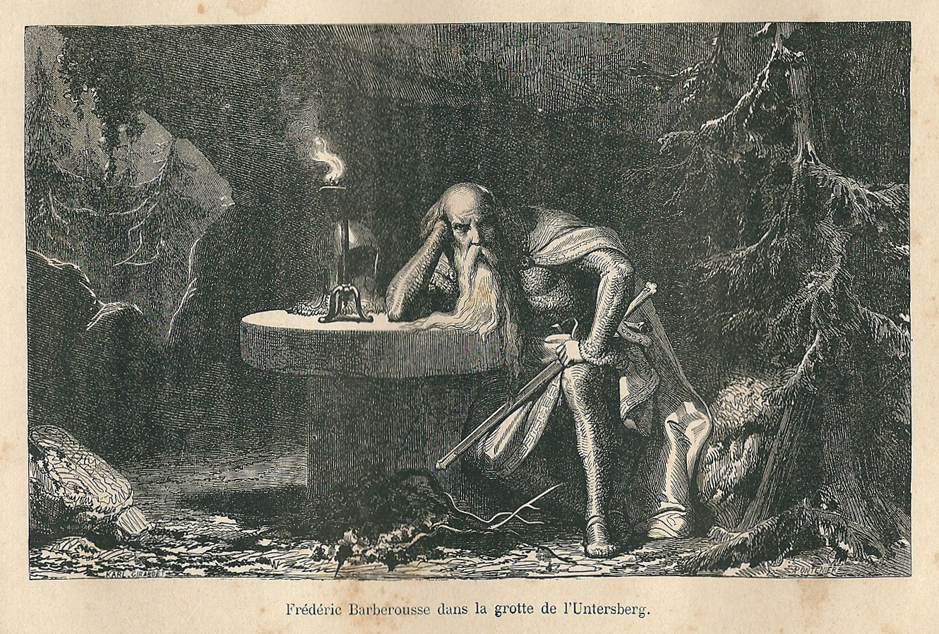 Frédéric Barberousse (empereur romain germanique : 1122 – 1190), qui attend, selon la légende, l'heure de son retour, dans l'Untersberg (près de Salzbourg en Autriche) - gravure du XIXe siècle.